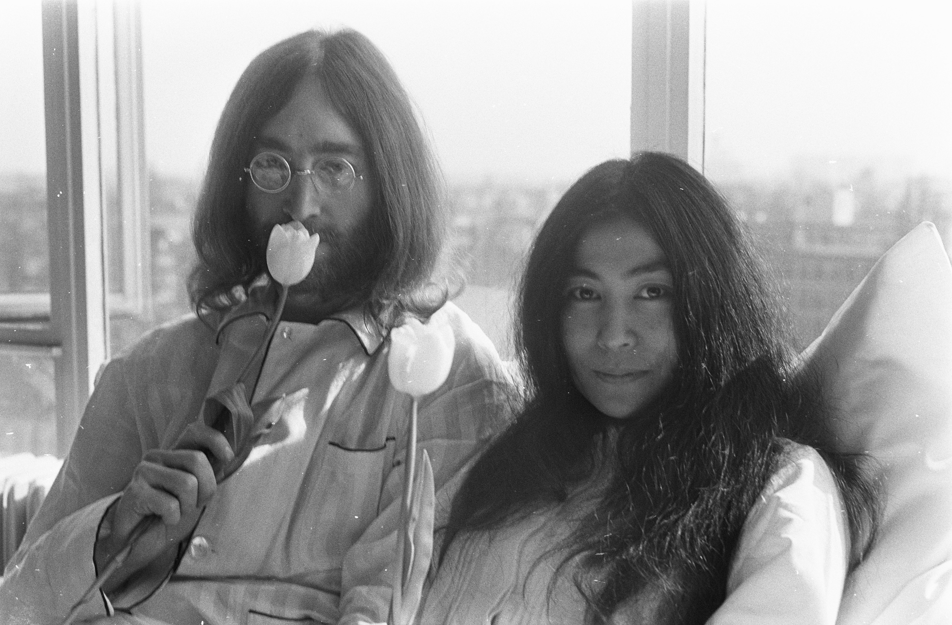 Collectie / Archief : Fotocollectie Anefo Reportage / Serie : [ onbekend ] Beschrijving : John Lennon en zijn echtgenote Yoko Ono op huwelijksreis in Amsterdam hielden persconferentie in bed in Hilton Hotel, John Lennon en Yoko Ono Datum : 25 maart 1969 Locatie : Amsterdam, Noord-Holland Trefwoorden : echtparen, hotels, musici, persconferenties, zangers Persoonsnaam : Lennon, John, Ono, Yoko Fotograaf : Koch, Eric / Anefo Auteursrechthebbende : Nationaal Archief Materiaalsoort : Negatief (zwart/wit) Nummer archiefinventaris : bekijk toegang 2.24.01.05 Bestanddeelnummer : 922-2301